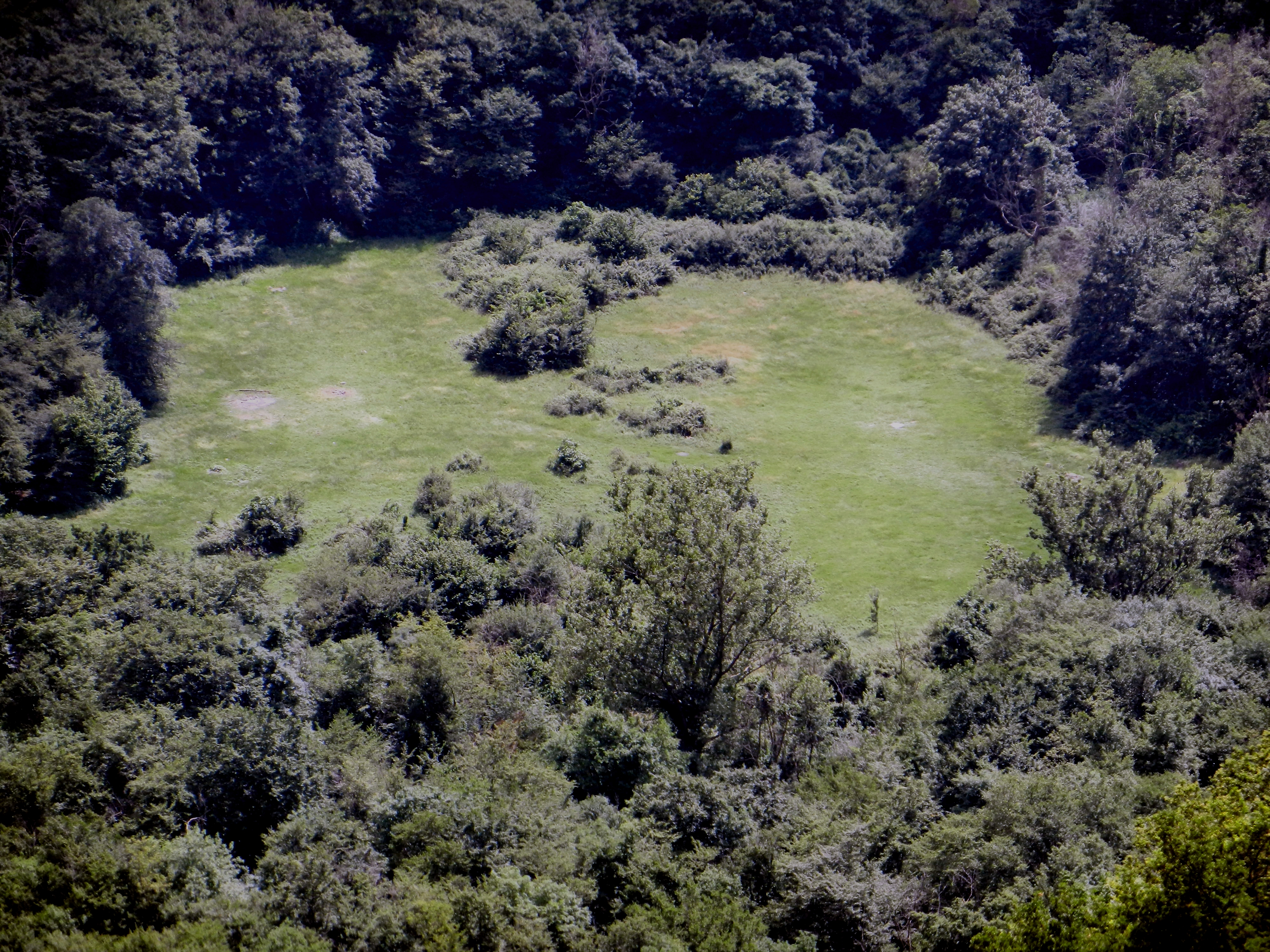 Genova, quartiere di Molassana, il prato Casarile